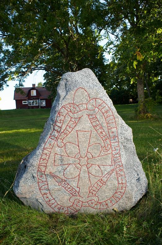 RAÄ-nummer Funbo 1:2. Inskriften lyder: : "Väder och Tägn och Gunnar reste denna sten efter Hörse, sin fader. Gud hjälpe hans ande".